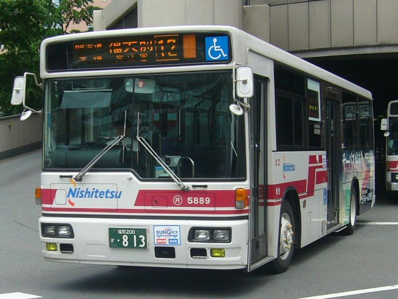 登録番号 福岡200か・813 西日本鉄道片江自動車営業所所属 車番5889 2006年5月9日 博多駅前にて撮影